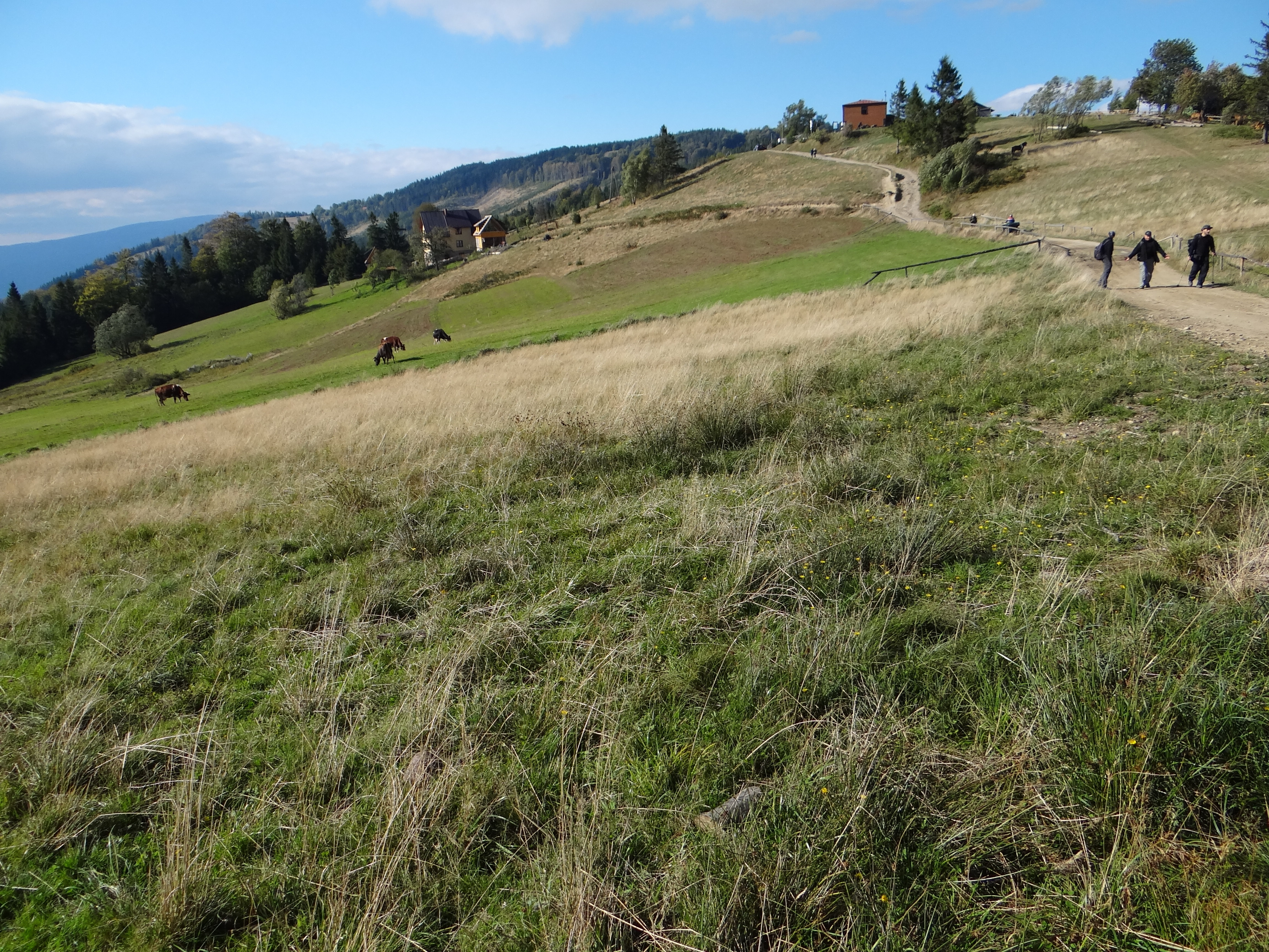 Hala Boracza